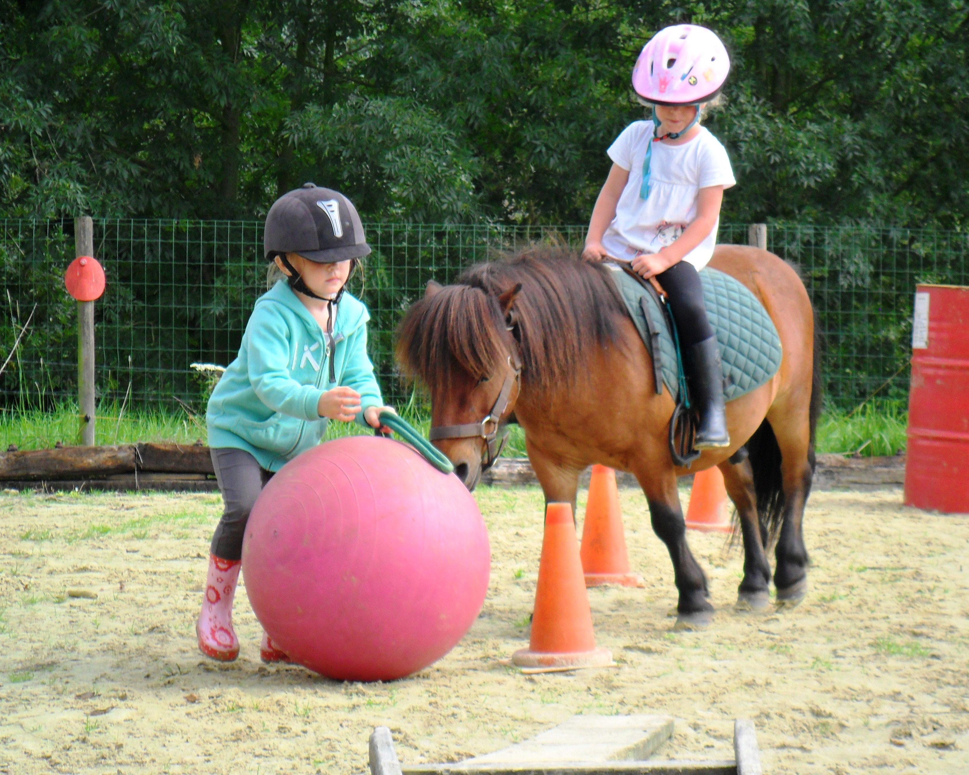 Psychomotricité avec poney